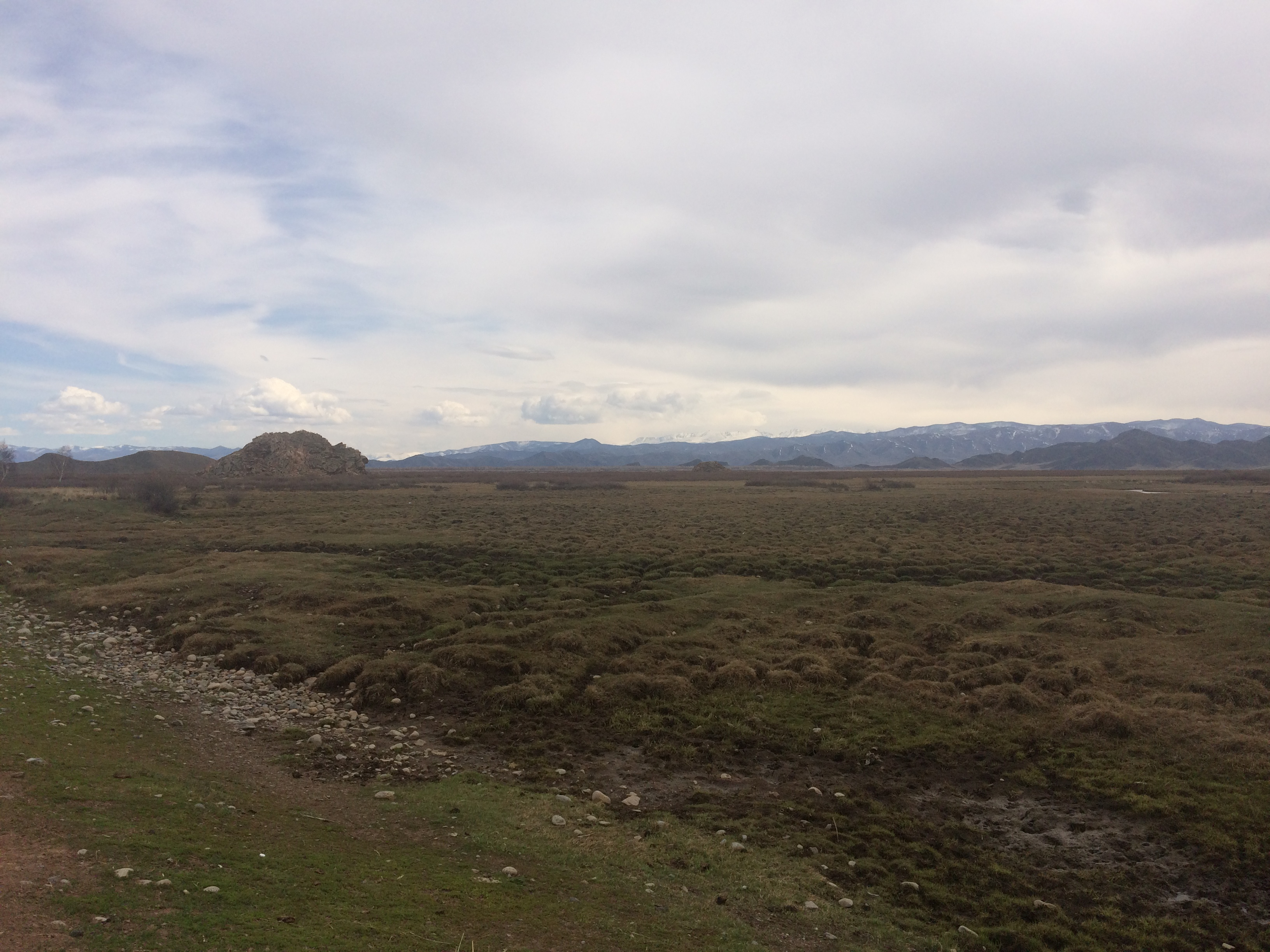 У въезда в село Кызыл-Даг Бай-Тайгинского кожууна Республики Тыва. Болотистые поля